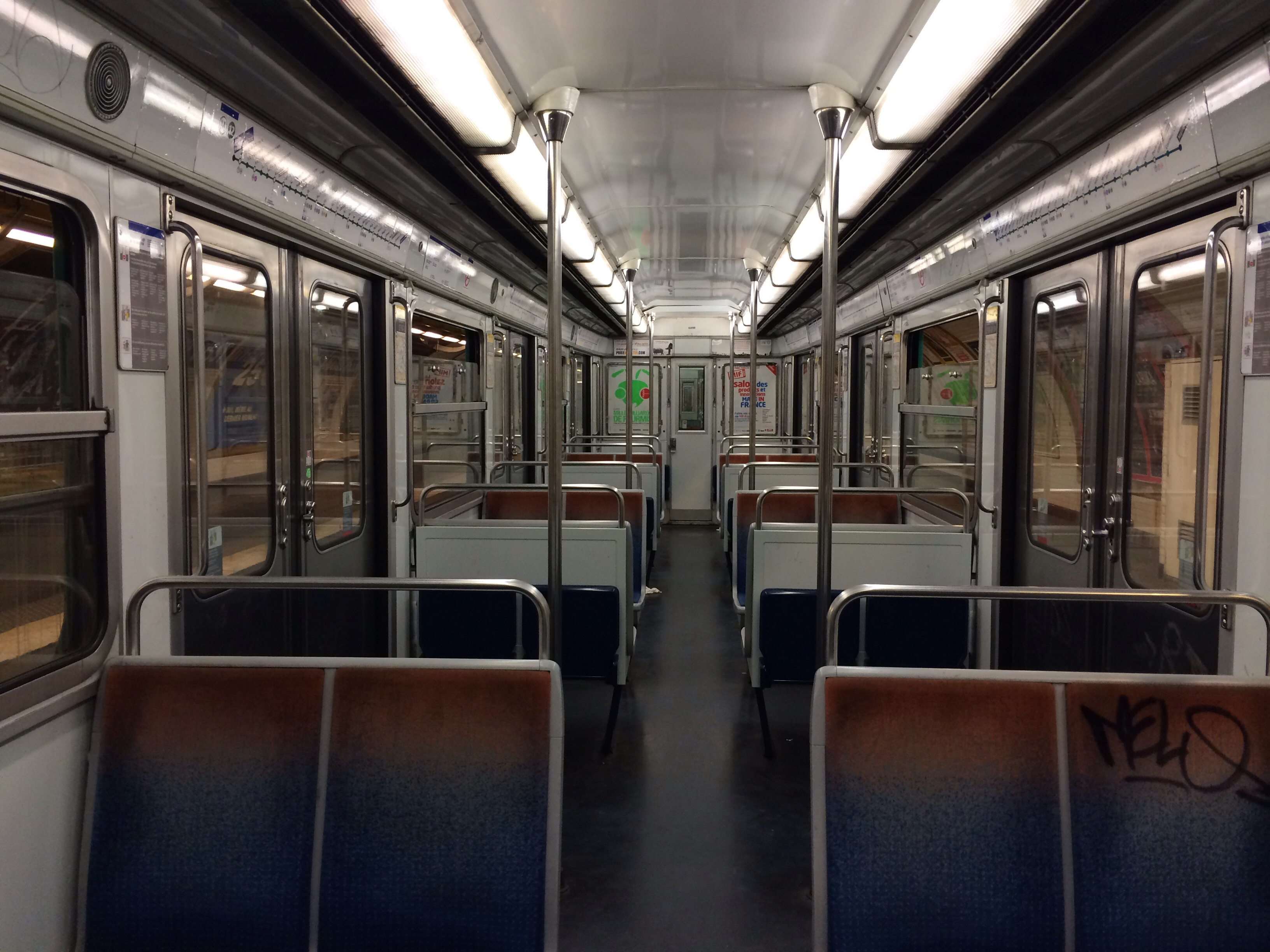 Intérieur d'une rame MF 67 à quai au terminus Mairie d'Issy de la ligne 12 du métro.